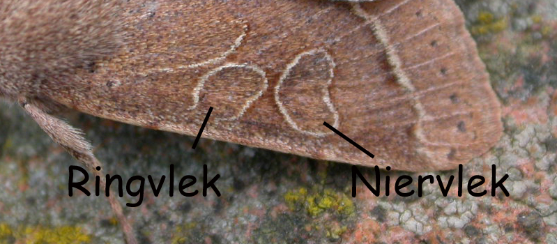 Uilvlekken (ringvlek en niervlek) bij Orthosia cerasi.